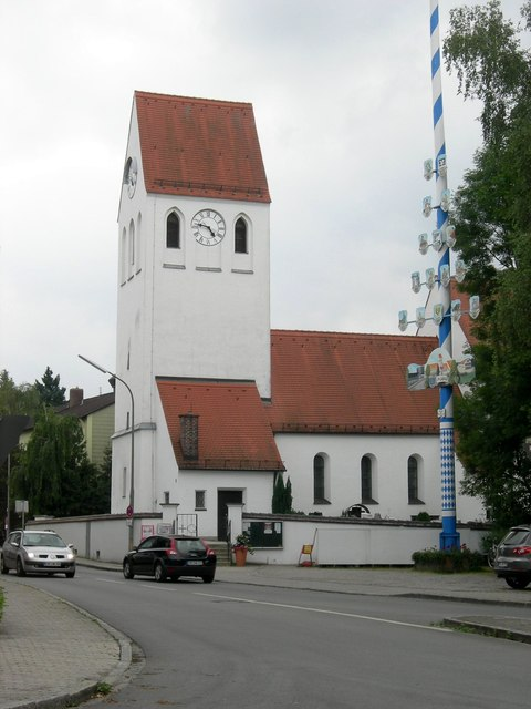 Poing, Pfarrkirche St. Michael